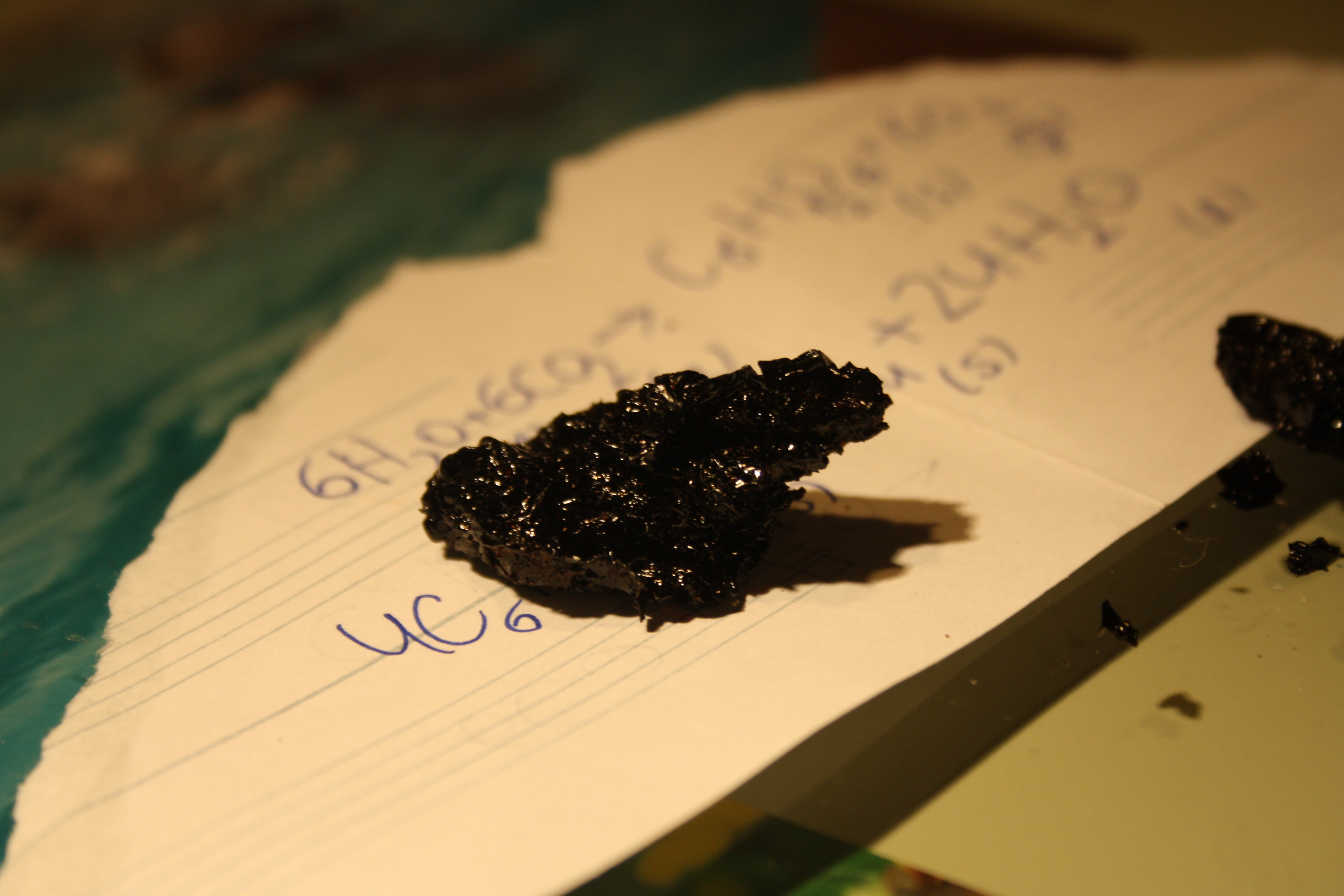 פחמן שנוצר כתוצאה מפירוק גלוקוז